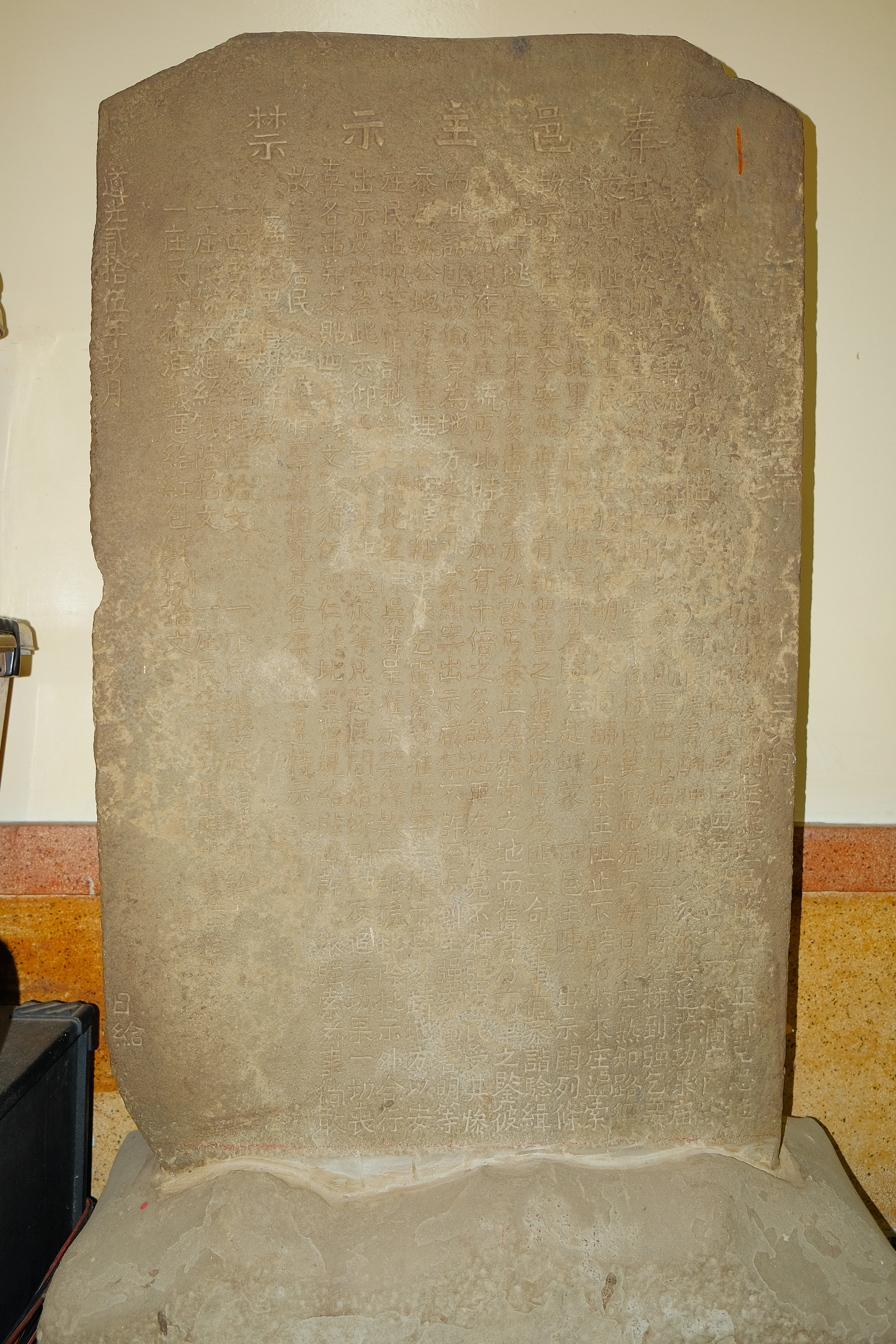 中文（台灣）: 2019 The Stele (1845) at Neimen ZiZhu Temple 道光二十五年九月 嚴禁流丐聚黨強索碑記 碑文 欽加府術、特調臺灣縣正堂、軍功加二級、紀錄三次胡，□□□□□□□□□□□，為流丐聚黨強索事。 □年七月十四日，據羅漢內門庄總理呂昭明、庄正鄭克思、地保林瑞泰等□□□：「窃維羅漢內門，山陬僻壞之區，四面環山，地方遼闊，庄民守分，□□□□流丐黨索，肆橫罔忌：舉凡村民慶壽、酬神、演戲以及嫁娶、追荐功果、廟宇演戲者等事，流丐自稱「大例」，聚誘多則三、四十猛，少則三十餘名，擁到強乞，要錢要飯。從則無事；不從，聚黨較鬧，不索不休。村民莫何！而流丐每日來庄，熟知路徑，夜則勾匪窃偷。庄民受害，告投不休。明等公同舖戶、業主，阻止不聽，仍然來庄遍索。 查前次有仁德北里庄民、地保與丐首為強乞起□，蒙前邑主陳出示往列條款示禁在案，至今安然無事。茲有新豐里之舊社，聚丐為匪，誣命滋事，荷蒙請驗緝拏。流丐逃竄，往來甚多，番慈寮亦將設丐寮，正為聚黨之地。而舊社乃前車之鑒！彼禍稍滅，現在來庄流丐比時常加有十倍之多。誠恐再為聚黨，不特強索，民受其慘；而且誘匪窃偷，竟為地方之害。非蒙照案出示嚴禁，不許流丐到庄強索、偷害。明等忝屬辦公，地方愼重，理合瀝情粘單，伏乞電察，恩准照案一律示禁，以靖地方，以安庄民！沾叩。」等情，計抄粘仁德北里陳、吳等呈准示禁條款一紙。 據此，除批示外，合行出示嚴禁。為此，示仰丐首人等知悉：爾等凡遇民間婚嫁、酬神及追荐功果、一切喪喜各事，行求貼四季錢文，務須仿照仁德北里舊規給貼，毋許黨眾強索滋事；倘敢故違，許居民人等隨時稟請拘究。其各凜遵，毋違！特示。 仁德北里舊規條款： 一、四季，每年應給錢陸拾文。 一、庄民婚娶，應給錢捌拾文。 一、庄民嫁女，應給錢陸拾文。 一、庄民喪事功果，應給錢陸拾文。 一、庄民酬神演戲，應給紅包錢捌拾文。 道光貳拾伍年玖月 日給。